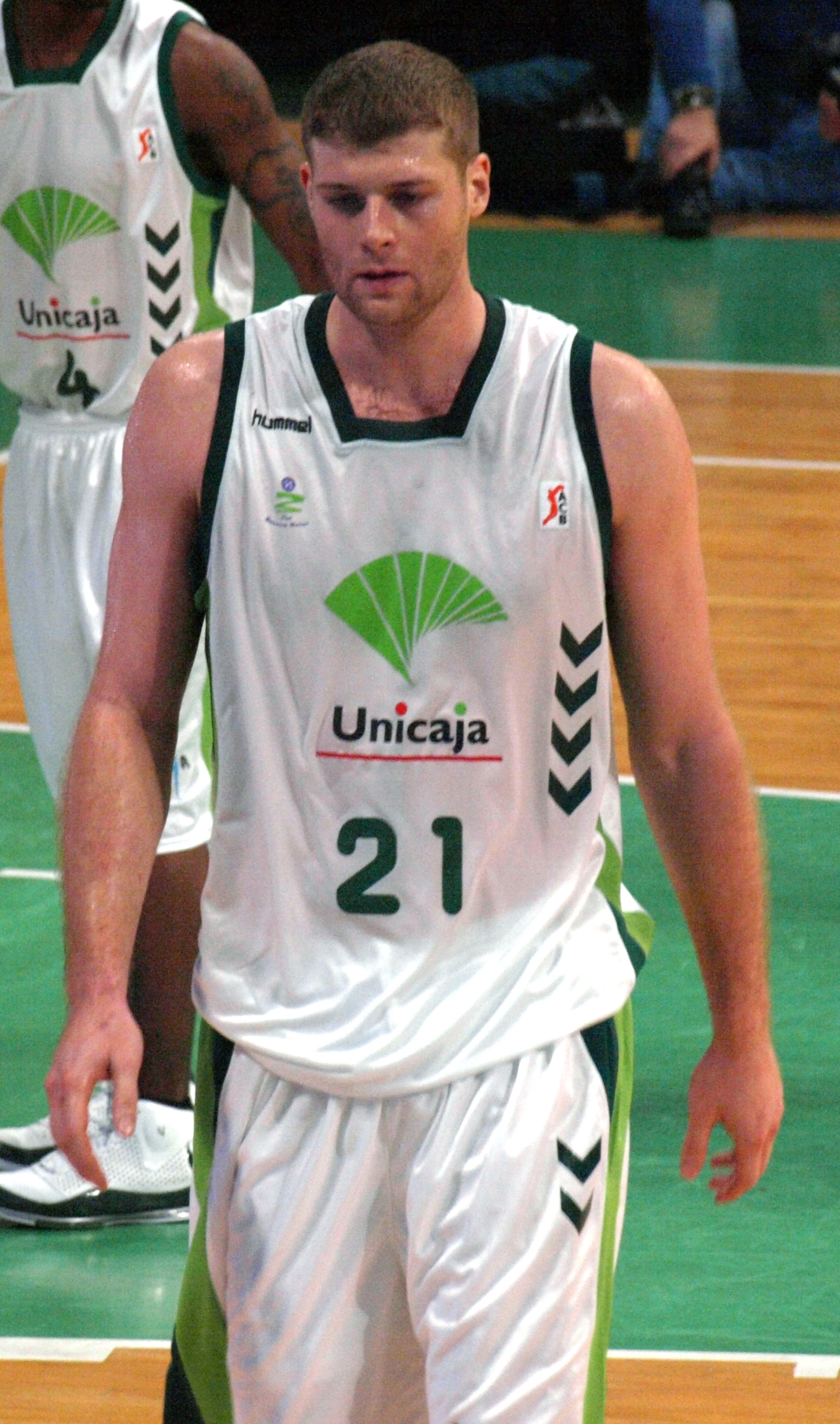 Robert Archibald, en el partido que enfrentó al al Unicaja Málaga y al DKV Joventut de liga ACB en el Olímpico de Badalona en 2009